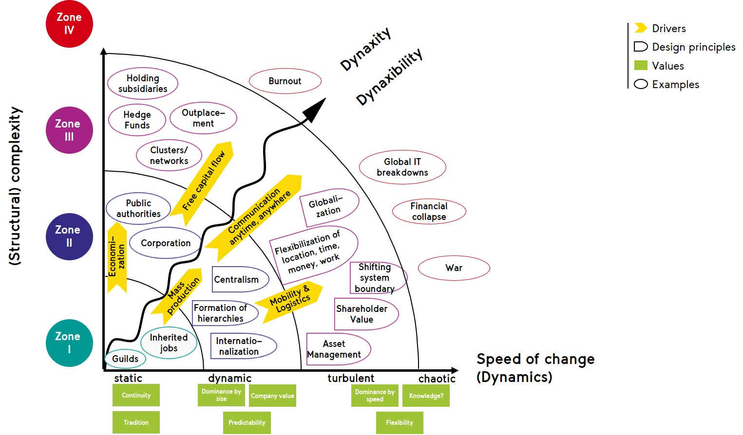 Dynaxibility and Dynaxity